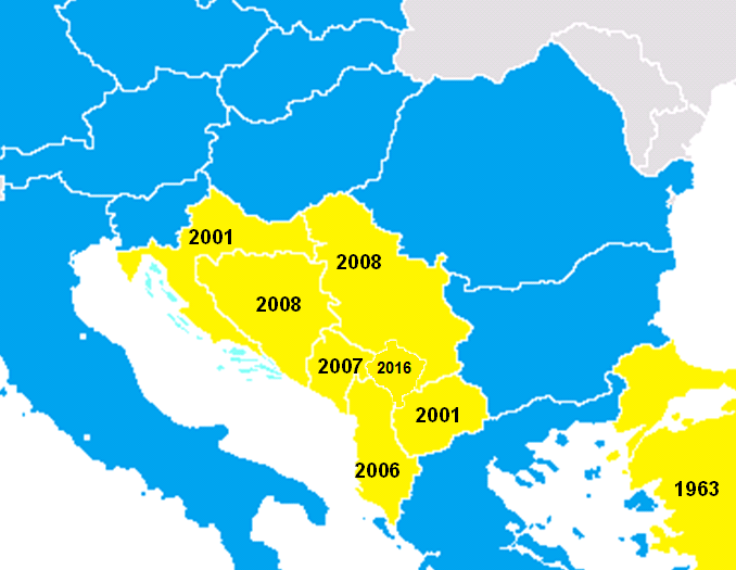 Aggiornamento dei paesi aderenti al SAA